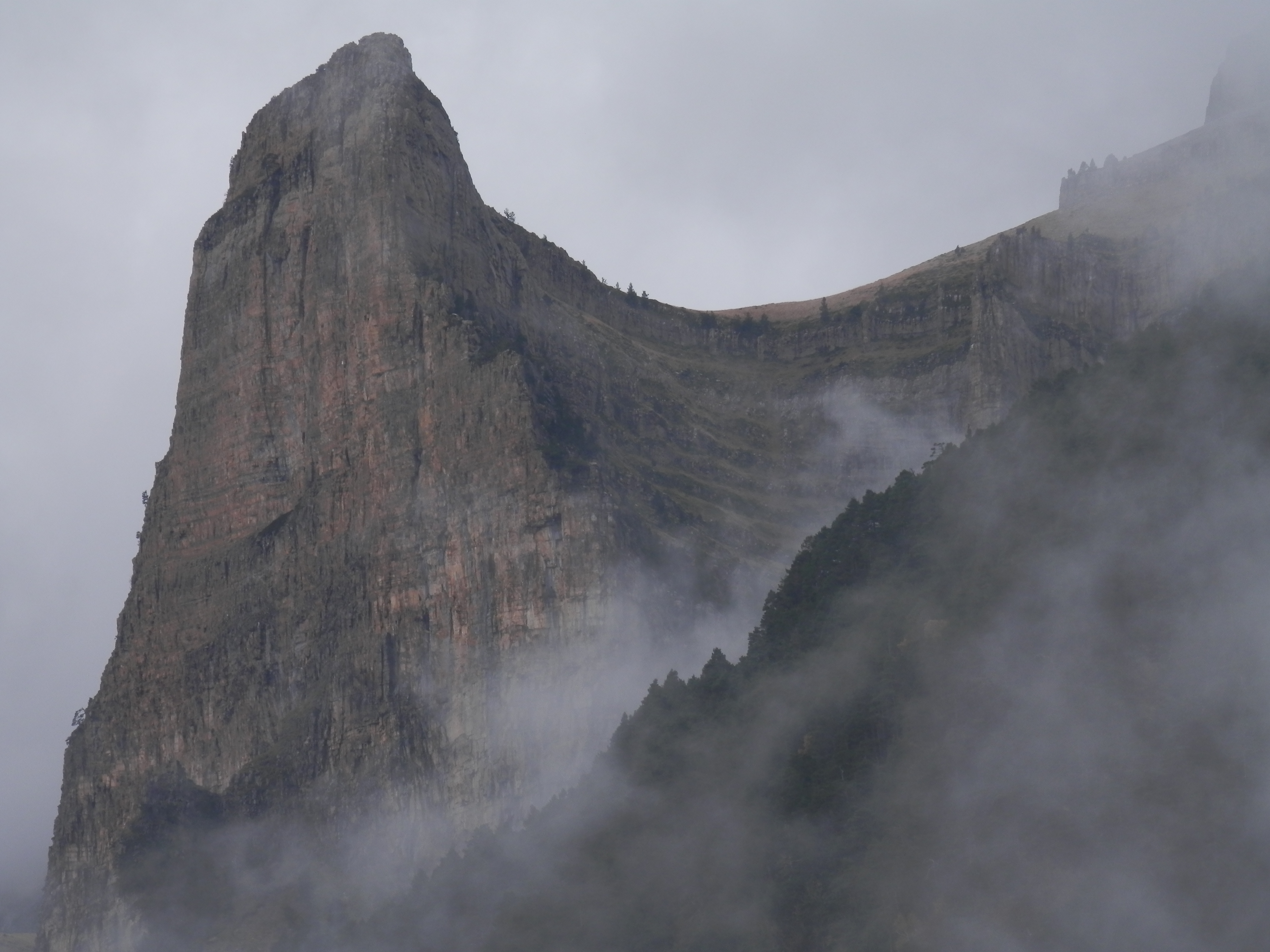 Tozal del Mallo desde la Pradera de Ordesa